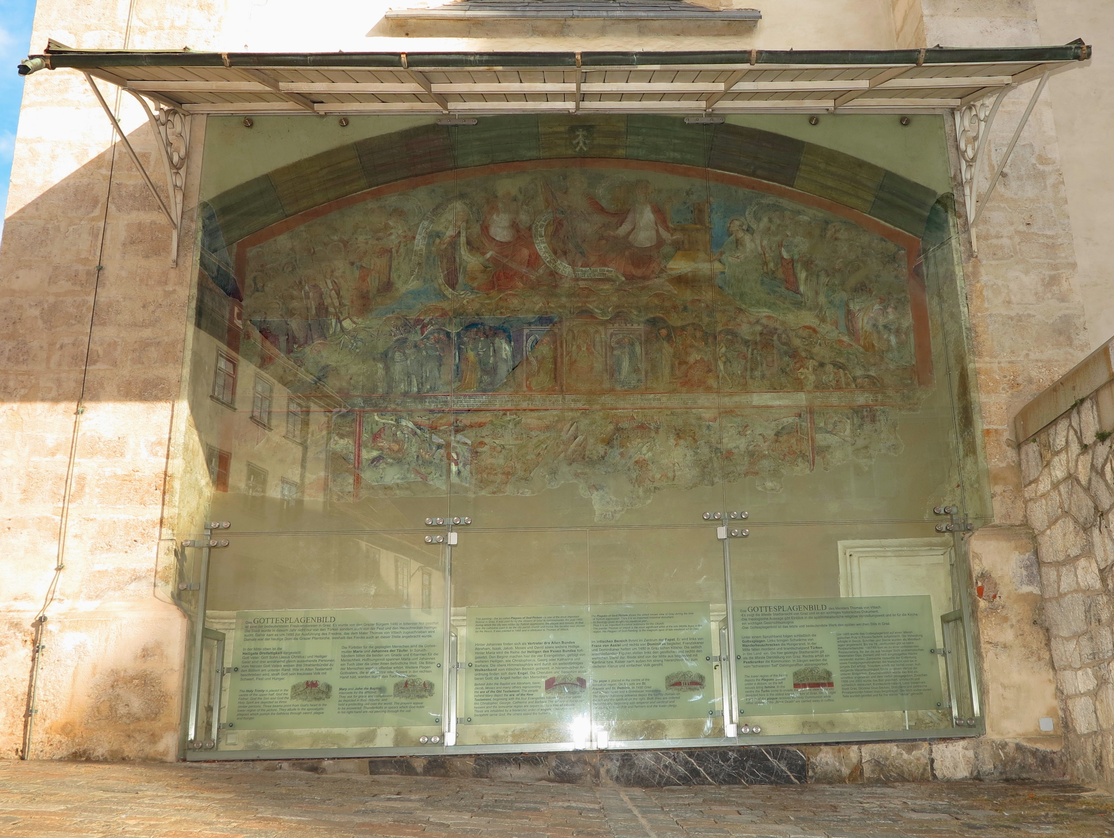 Das Landplagenbild an der südlichen Außenmauer des Grazer Domes.